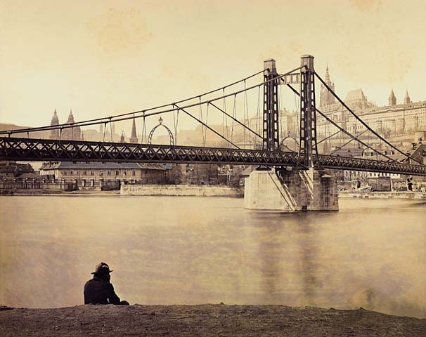 Rudolfova (Železná) lávka v Praze (zbořena 1914)